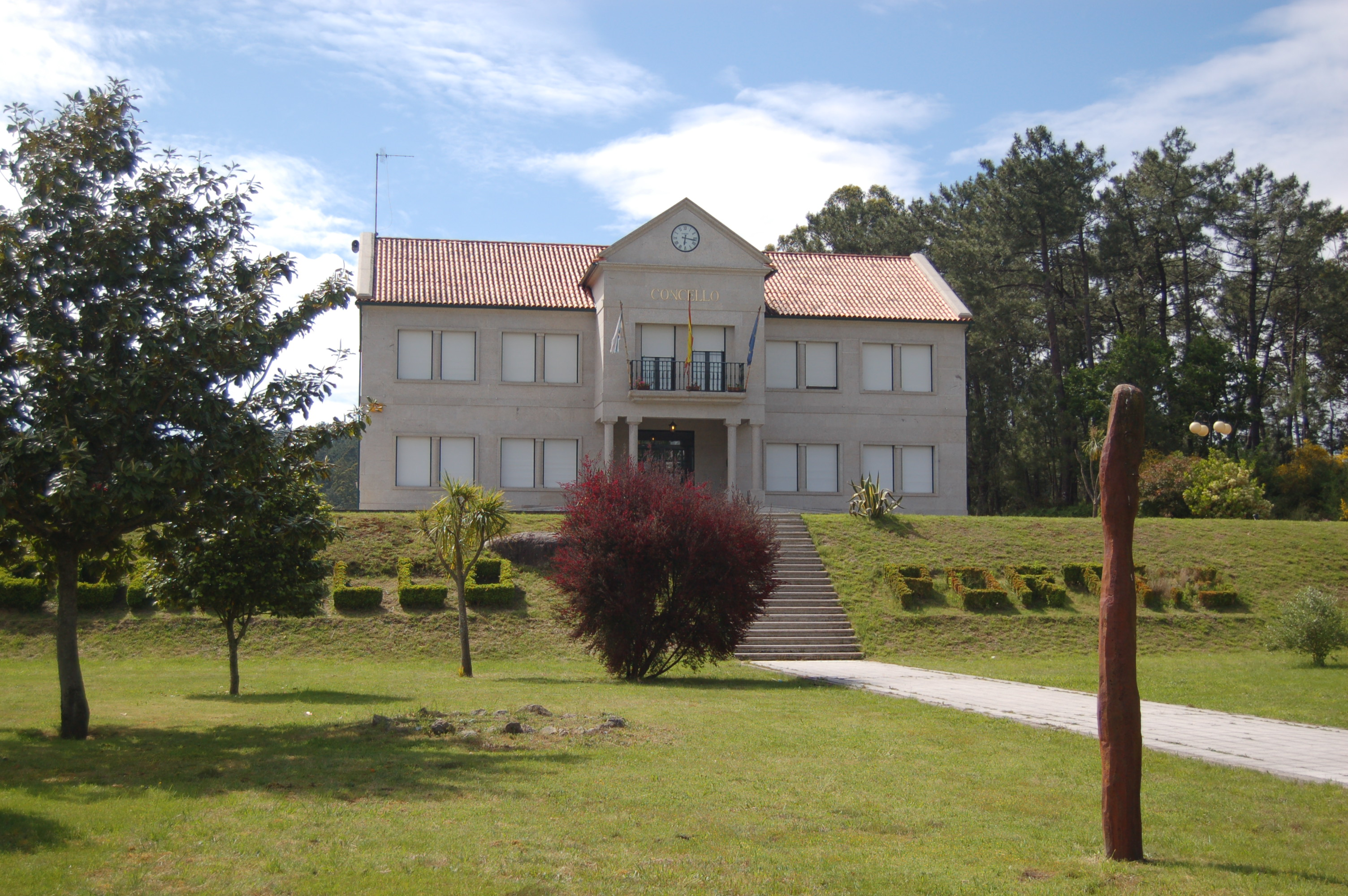 Casa consistorial de Portas